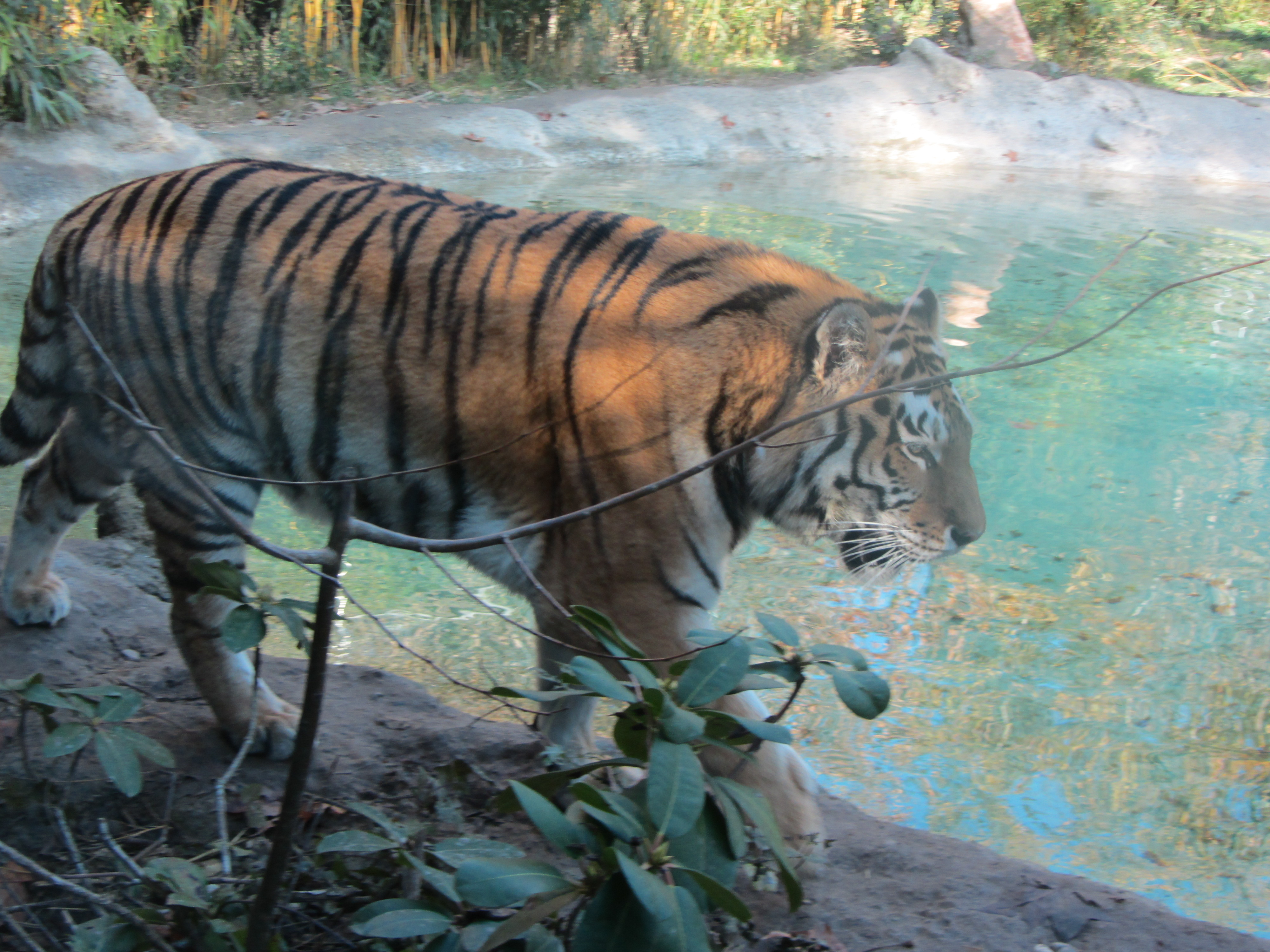 Una Tigre Siberiana (Panthera tigris altaica) fotografata al Parco Natura Viva sul lago di Garda, in Italia.